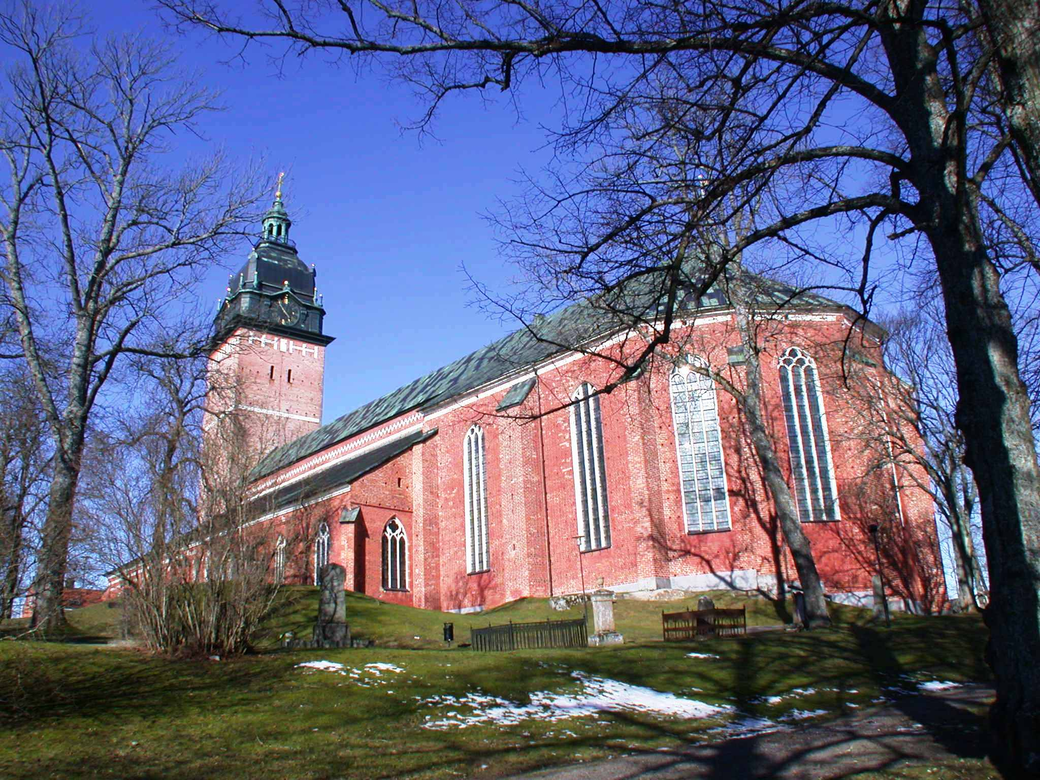 Strängnäs cathedral, Strängnäs, Sweden. Photo by Riggwelter, March 10, 2007.